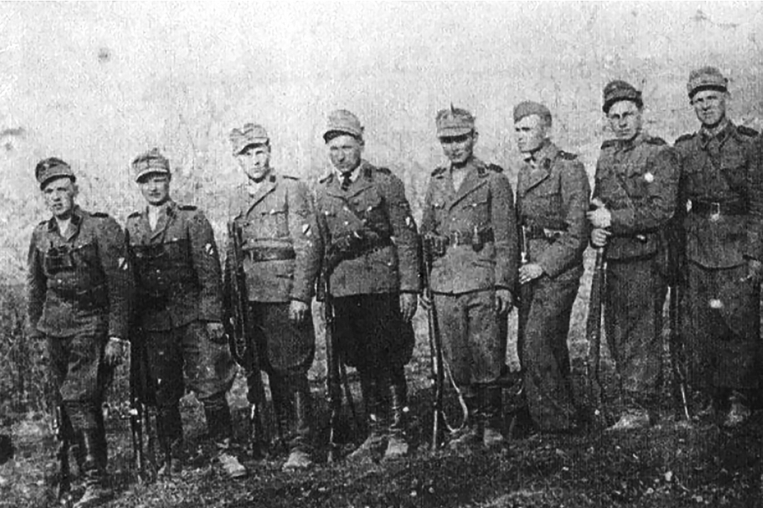 Беларуская (тарашкевіца): Зьвяз 13-га Беларускага паліцыйнага батальёну СД